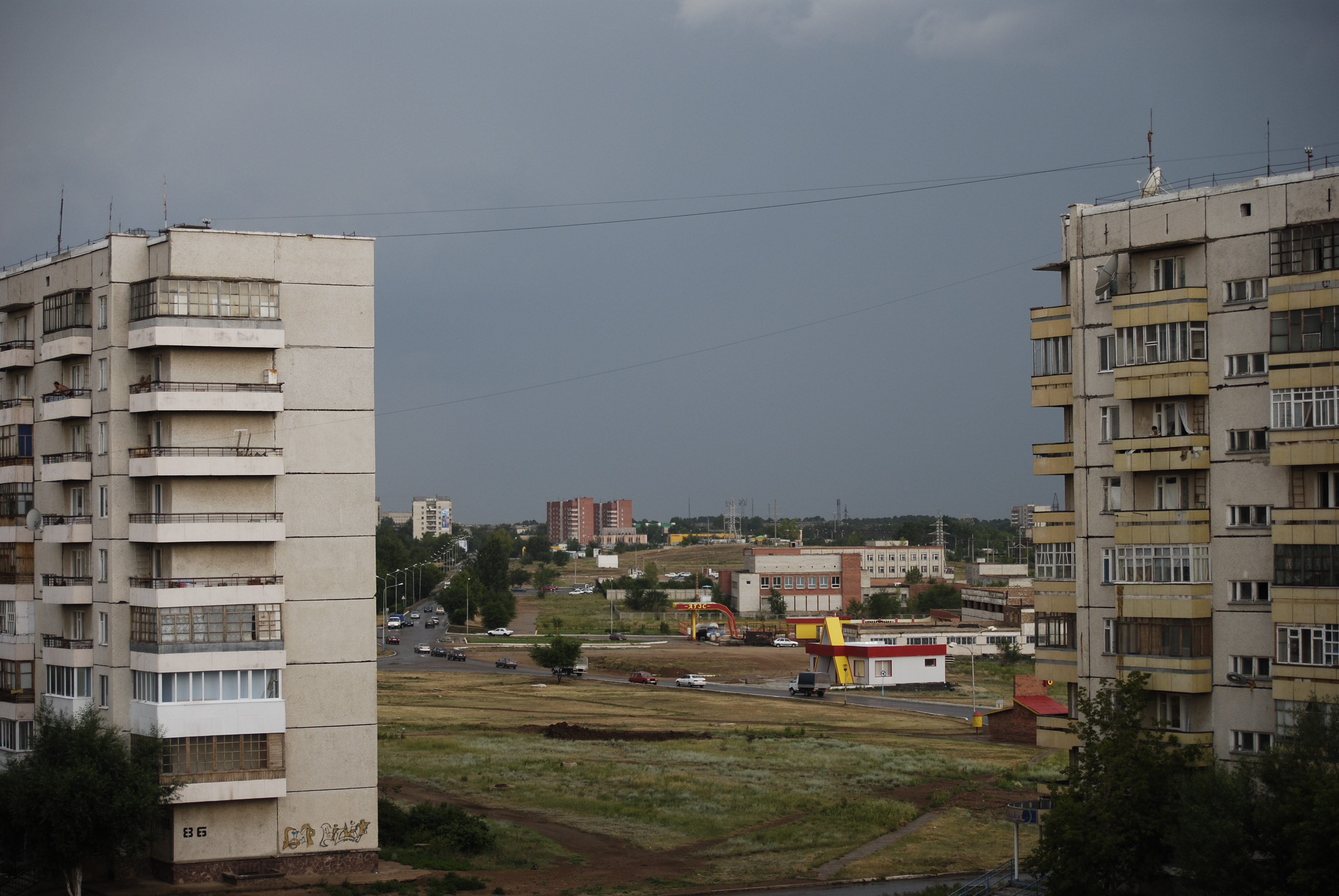 Степногорск, вид города